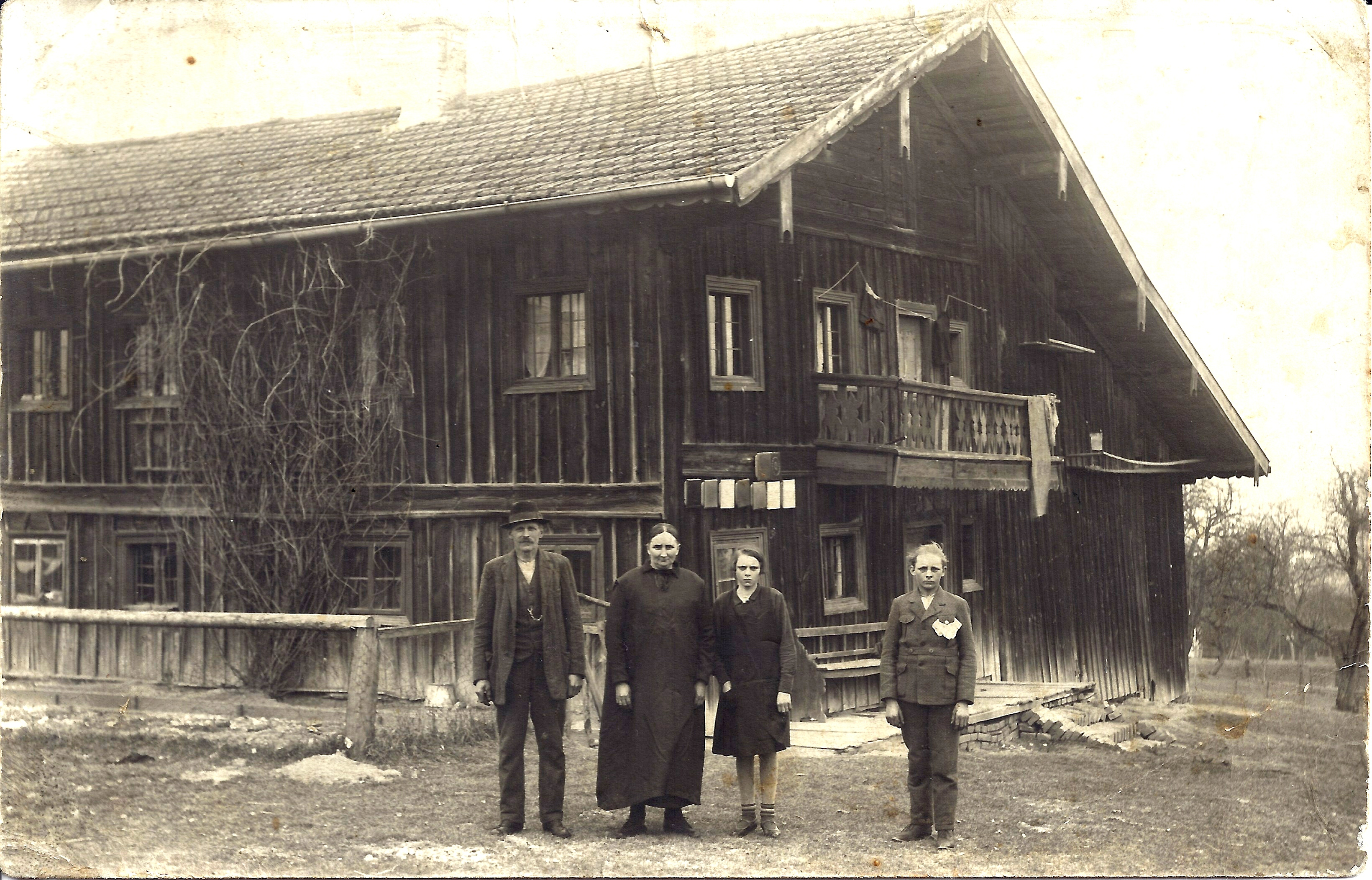 Töpferfamilie um 1920